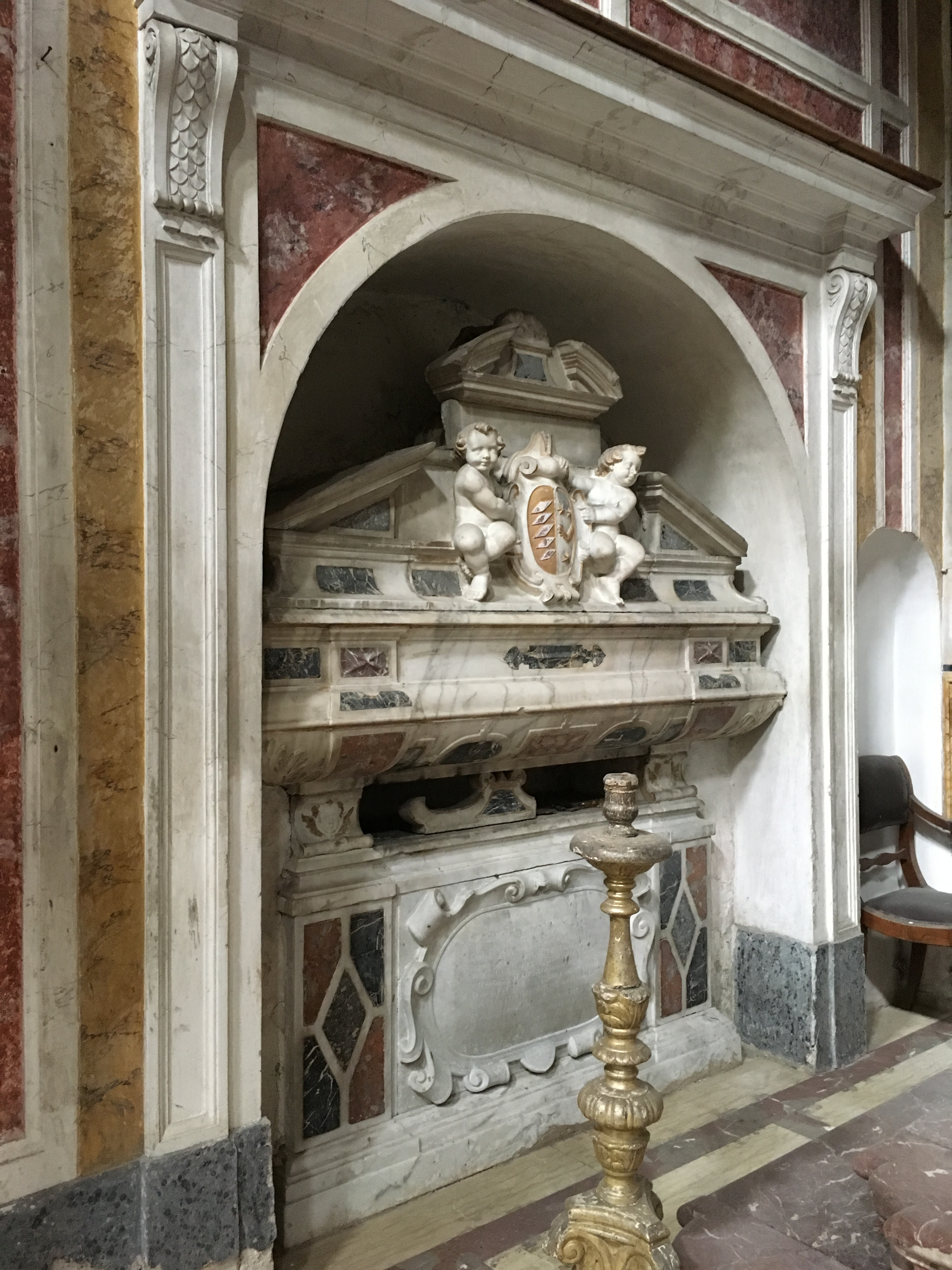 Santa Caterina (Palermo)